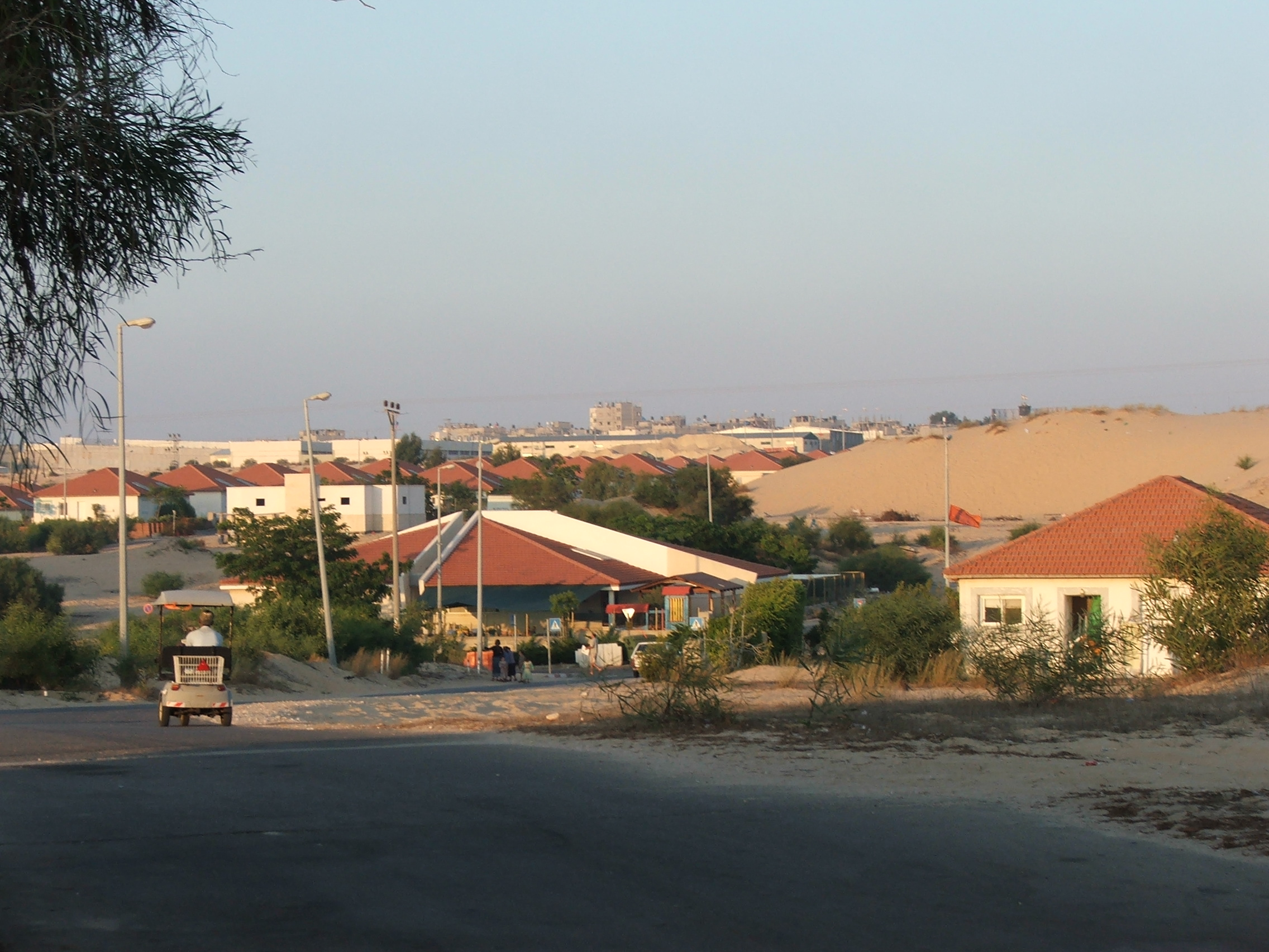 Homes in Neve Dekalim, Gush Katif